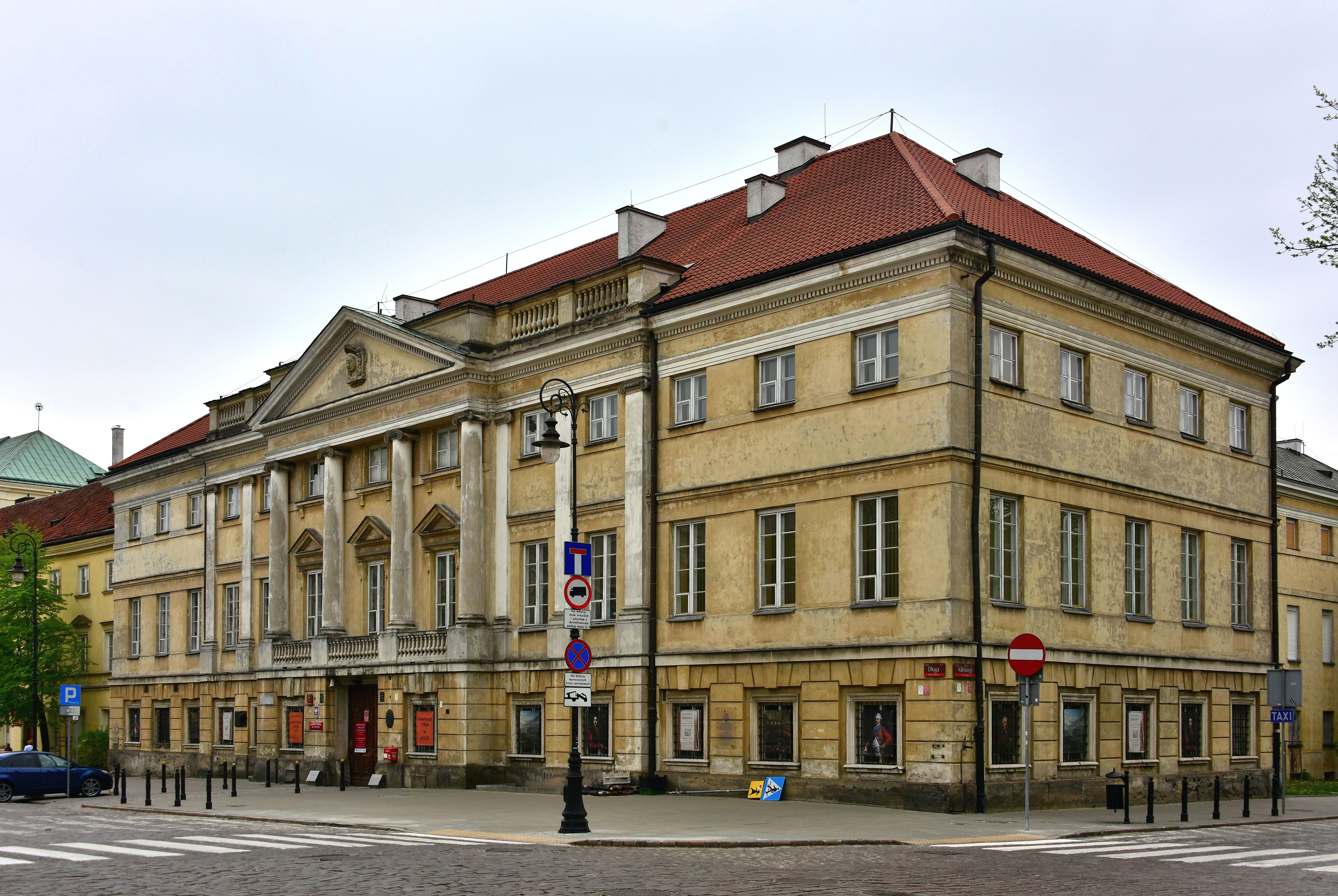 Pałac Raczyńskich przy ul. Długiej 7 w Warszawie